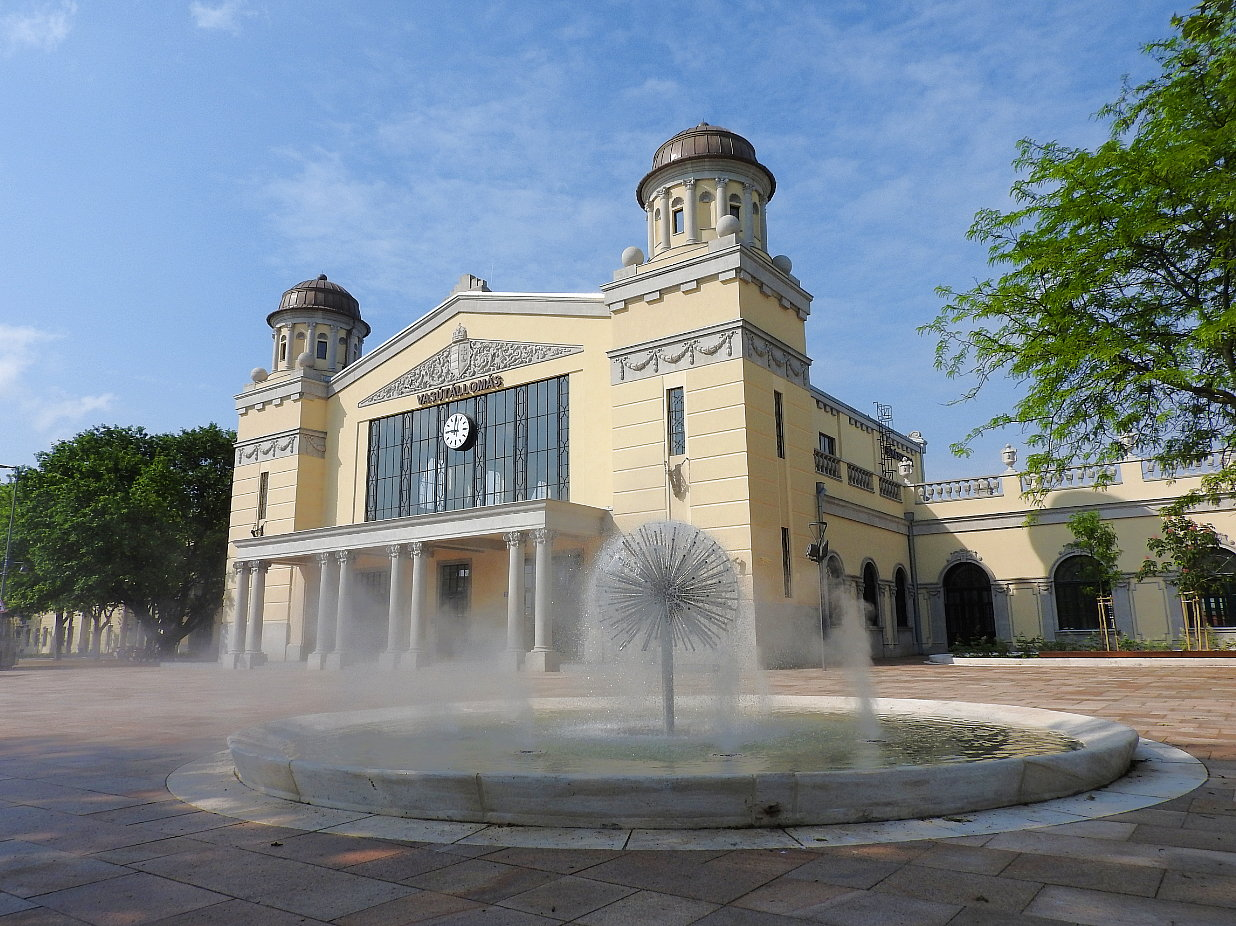 A békéscsabai vasútállomás felújított épülete